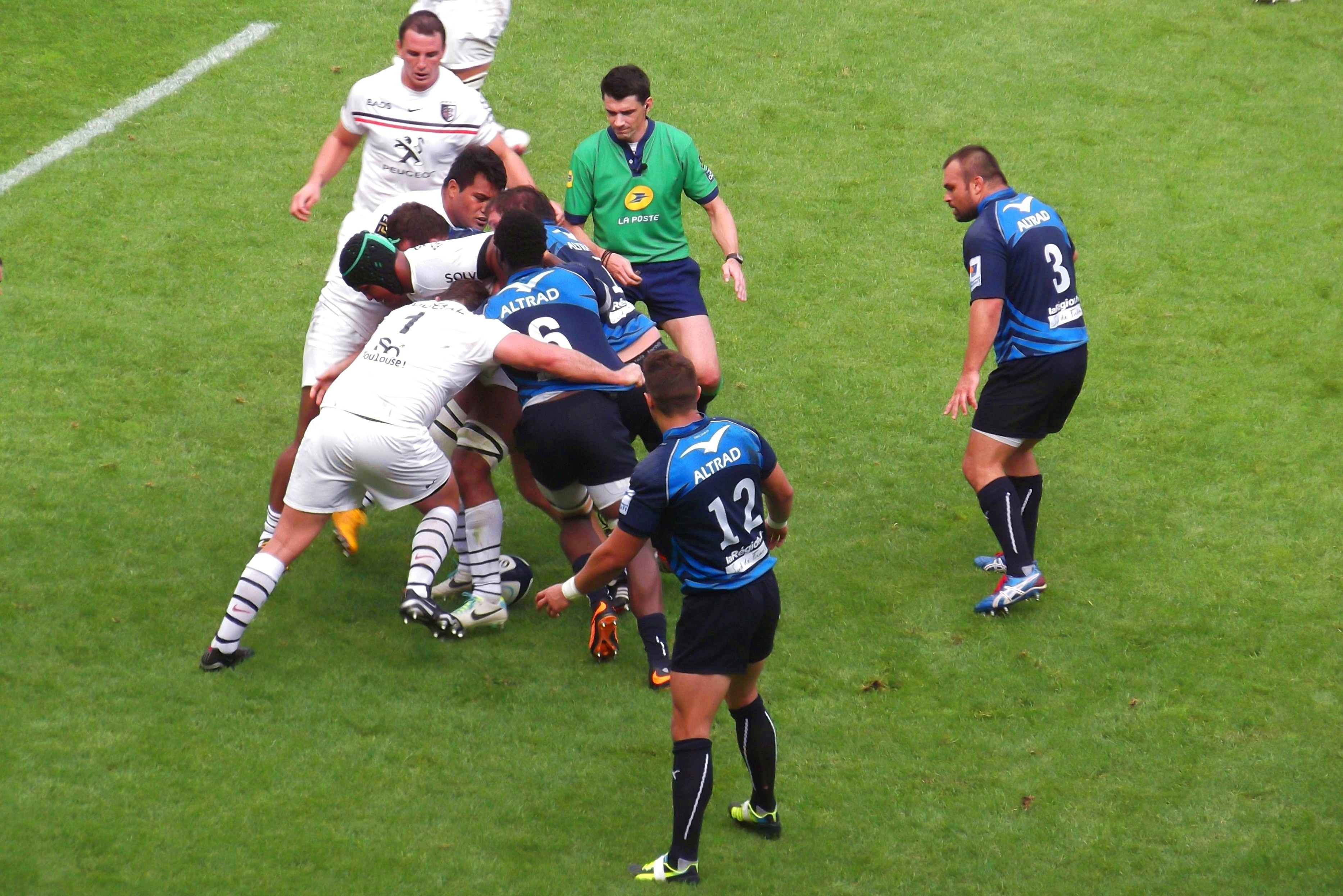 Nicolas Mas (à droite), MHR-Toulouse.